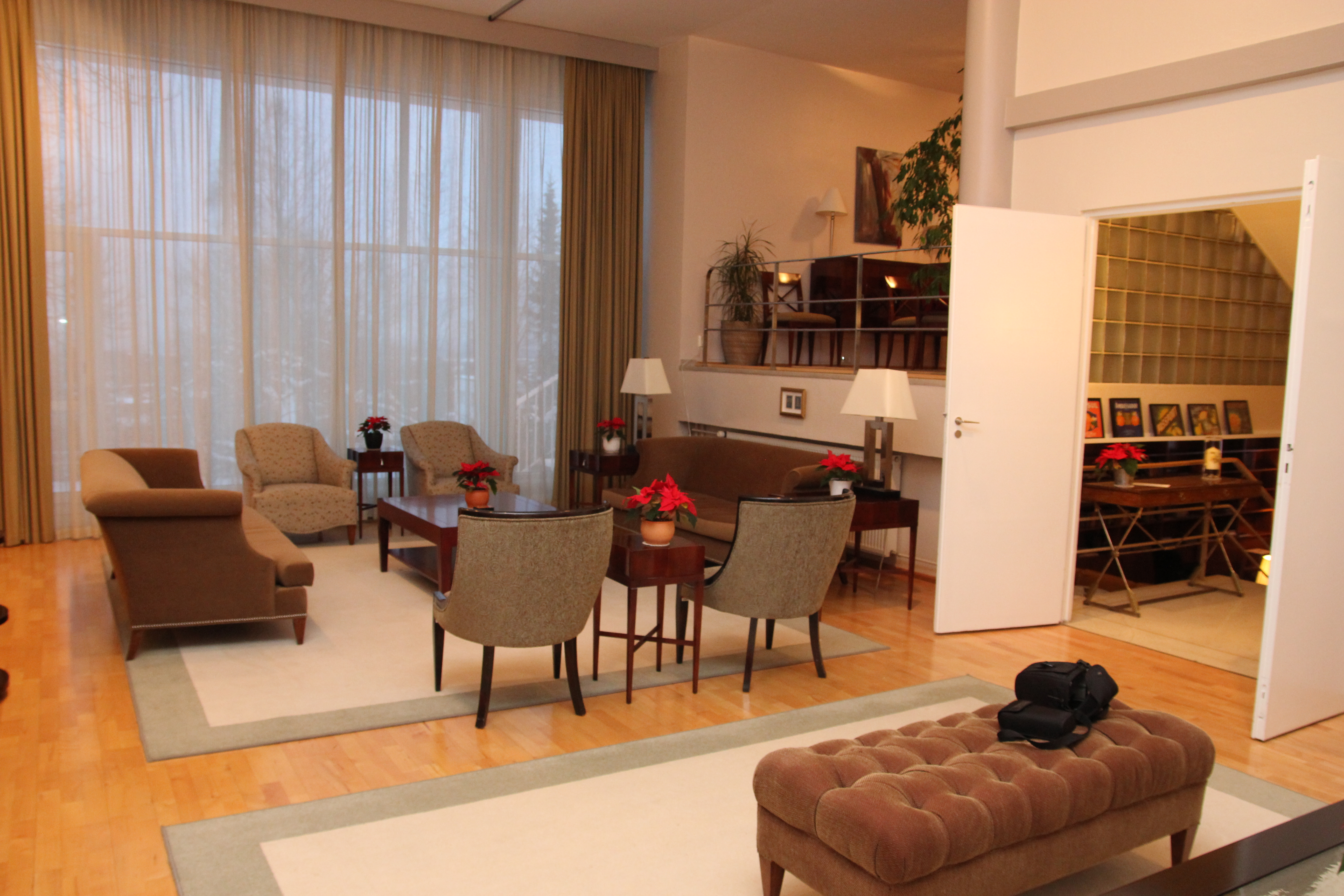 Villa Ditlev-Simonsen, veststuen